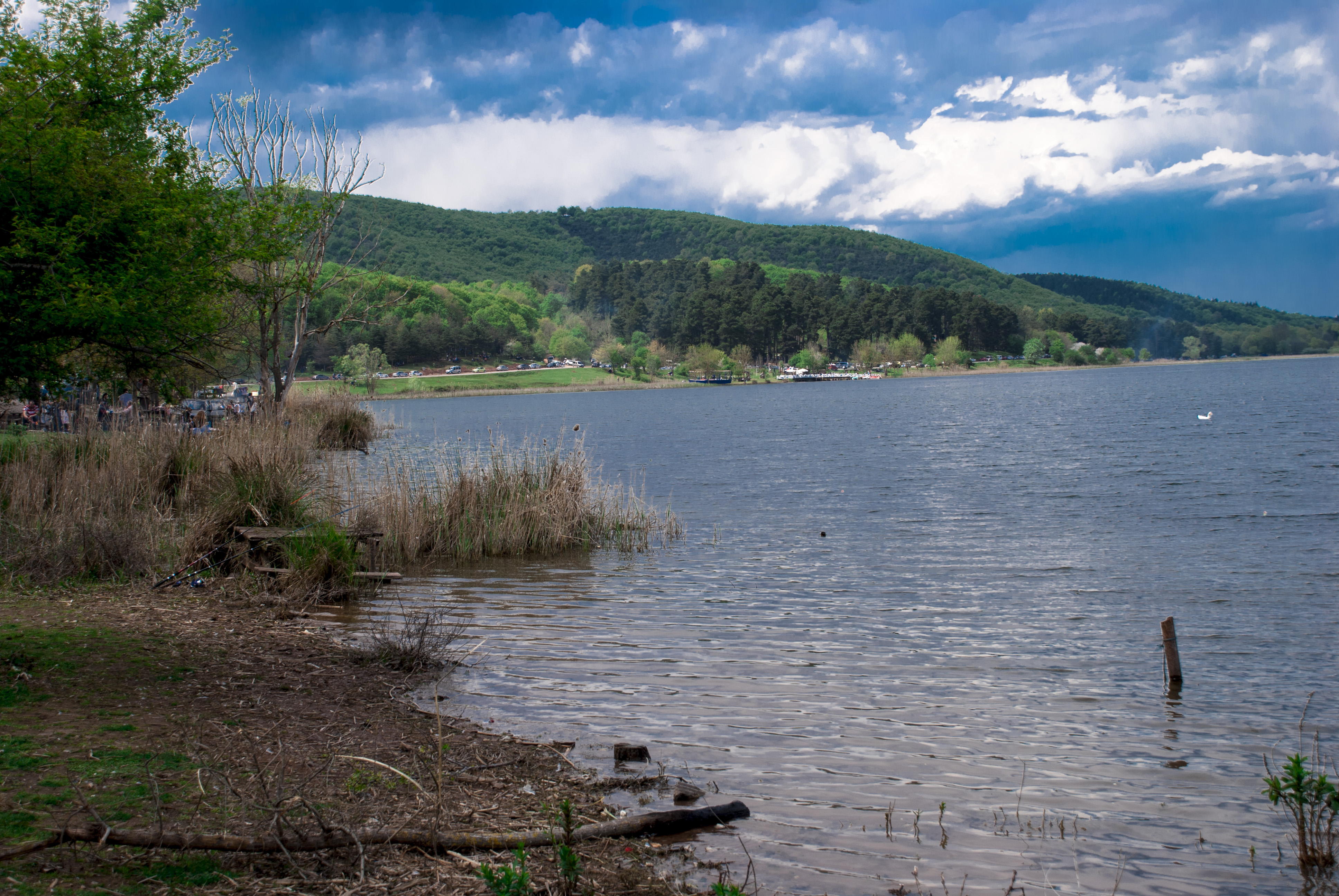 Poyrazlar Gölü'nde ilkbahar, Sakarya, 16 Nisan 2017